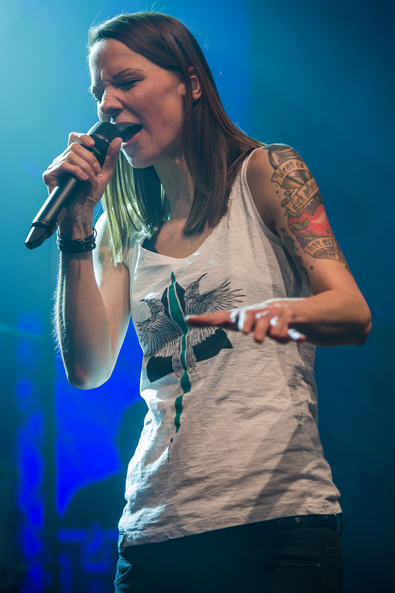 Christina Stürmer,Concertbüro Franken,Konzert,Livekonzert,Livemusik,Löwensaal,Musik